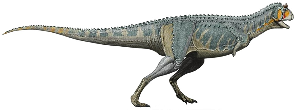 Carnotaurus - reconstruction